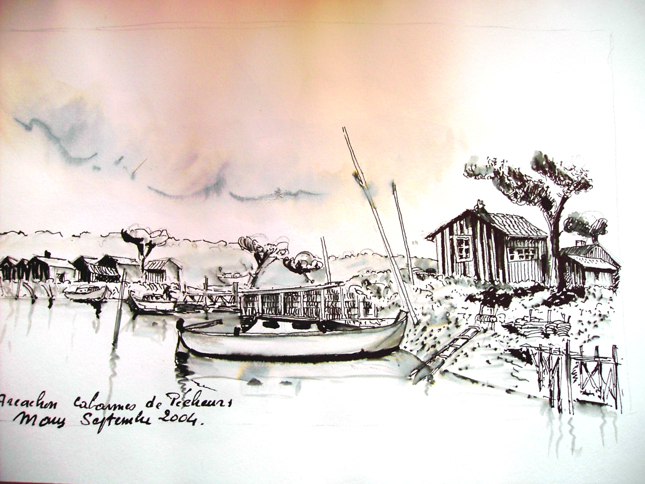 dessin a la plume des cabannes d'ostreiculteur dont je suis l'auteur--Michel mans 7 octobre 2006 à 11:01 (CEST)